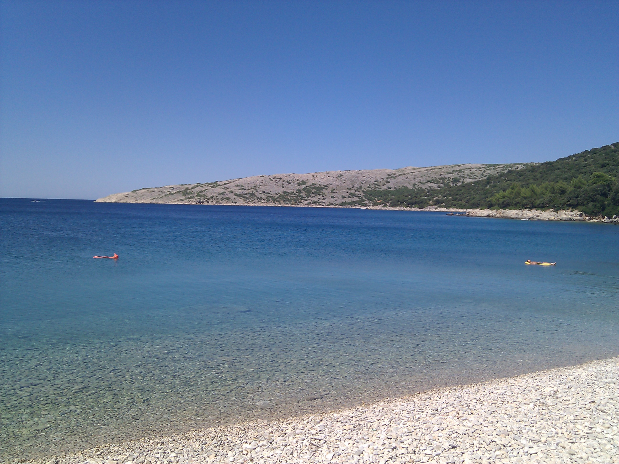 Ustrine, Croatia